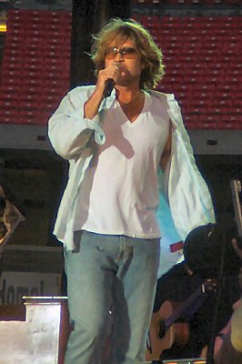 Billy ray cyrus at fan fair of 2005.